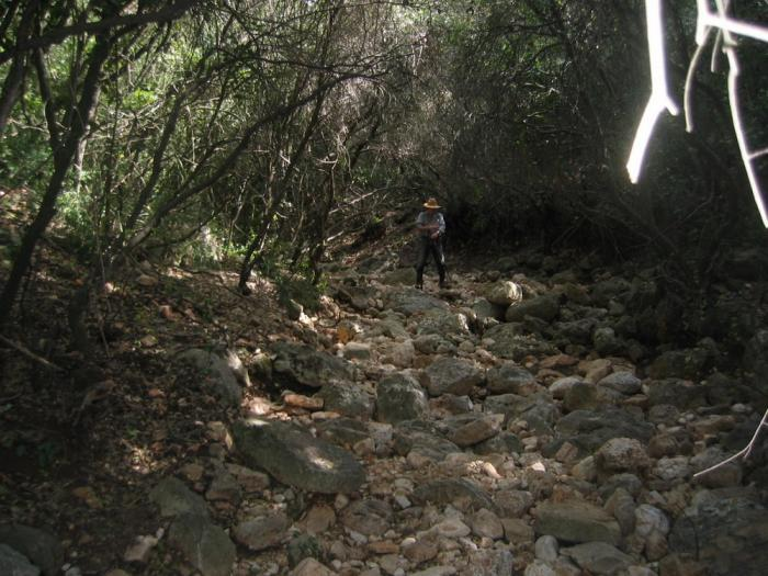 נחל יחיעם בין מבצר יחיעם לכליל